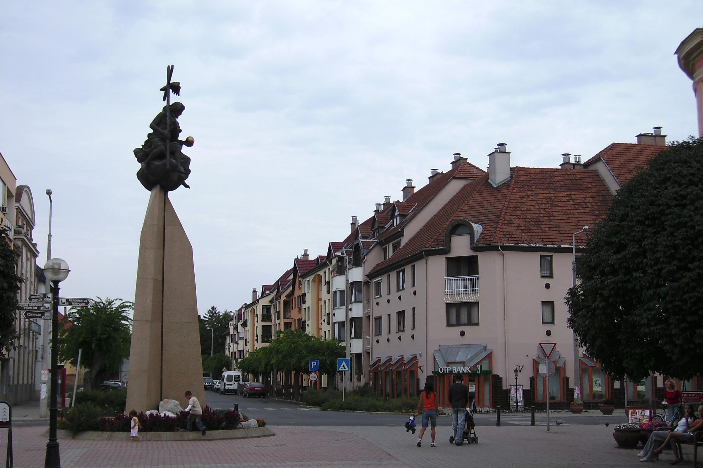 Szentháromság-szobor (Trischler Ferenc, Dévényi Sándor (építész), 1993). Mohács fennállásának 900. évfordulójának alkalmából állították a bronz alkotást. - Mohács, Szentháromság tér?, Szabadság utca, a Jókai utca és a Szentháromság utca találkozásánál